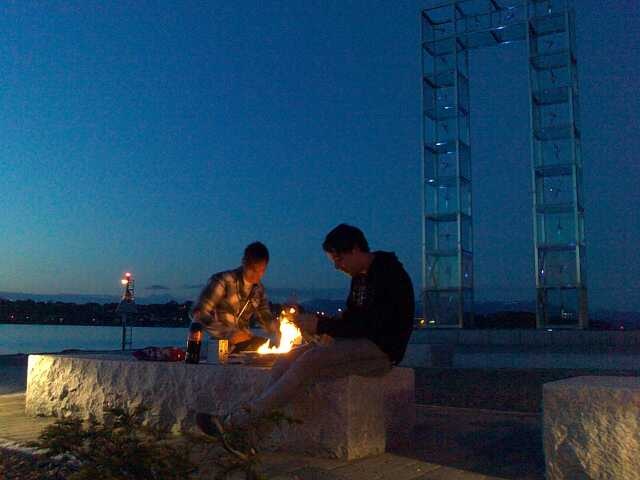 Grilling ved storddøra